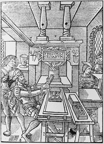 Emblem des Druckers Jodocus Badus Ascensius, 1520